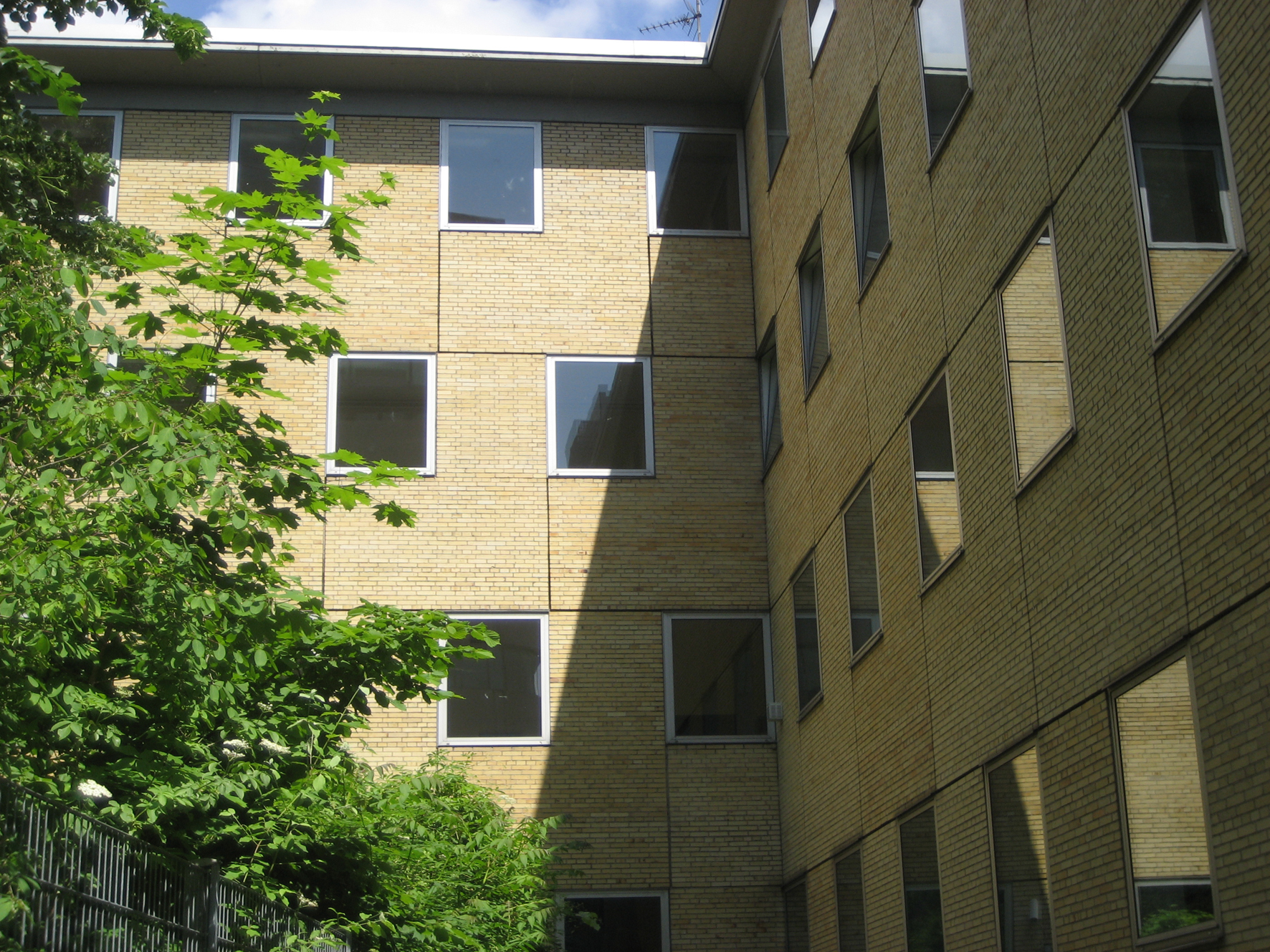 Rudolf Koch Schule, Offenbach. Architekt Adolf Bayer (1957)